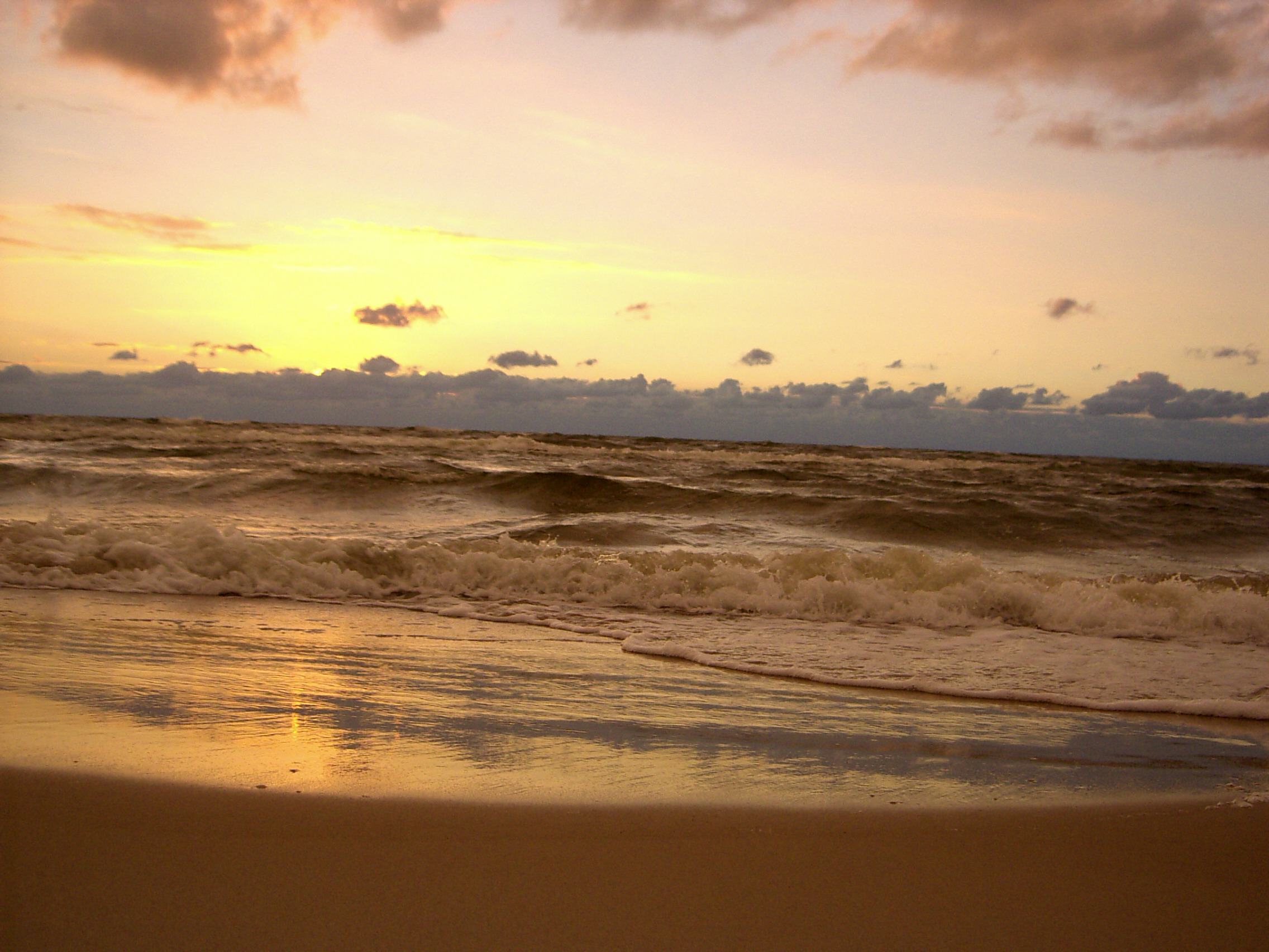 Plaża w Międzywodziu